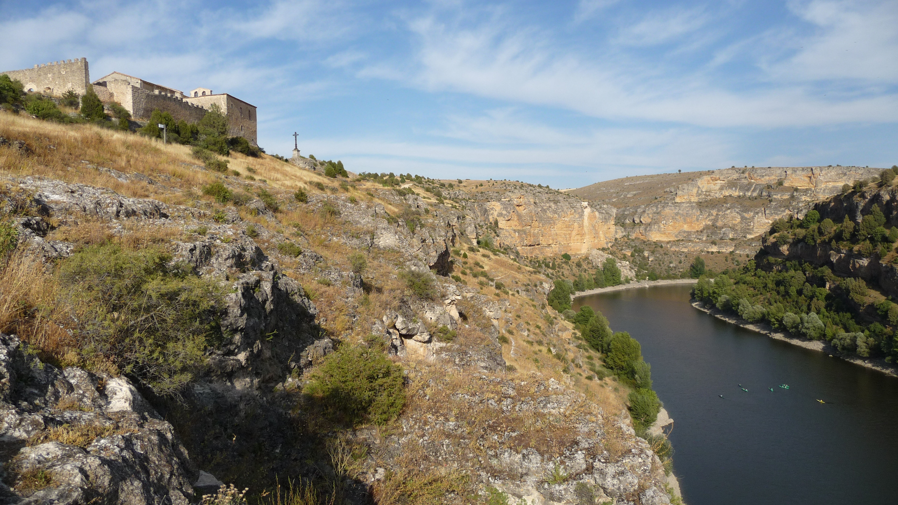 Situación de la ermita de San Frutos junto al río Duratón